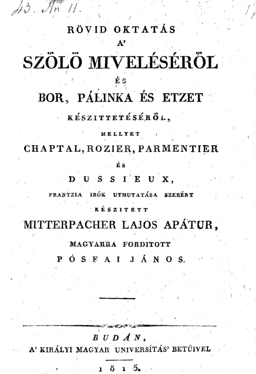 Rövid oktatás a' szölö miveléséröl és bor, pálinka, és etzet készittetéséröl, mellyet Chaptal, Rozier, Parmentier és Dussieux frantzia irók utmutatása szerént készitett Mitterpacher Lajos apátur, magyarra forditott Pósfai János. Budán, 1815.